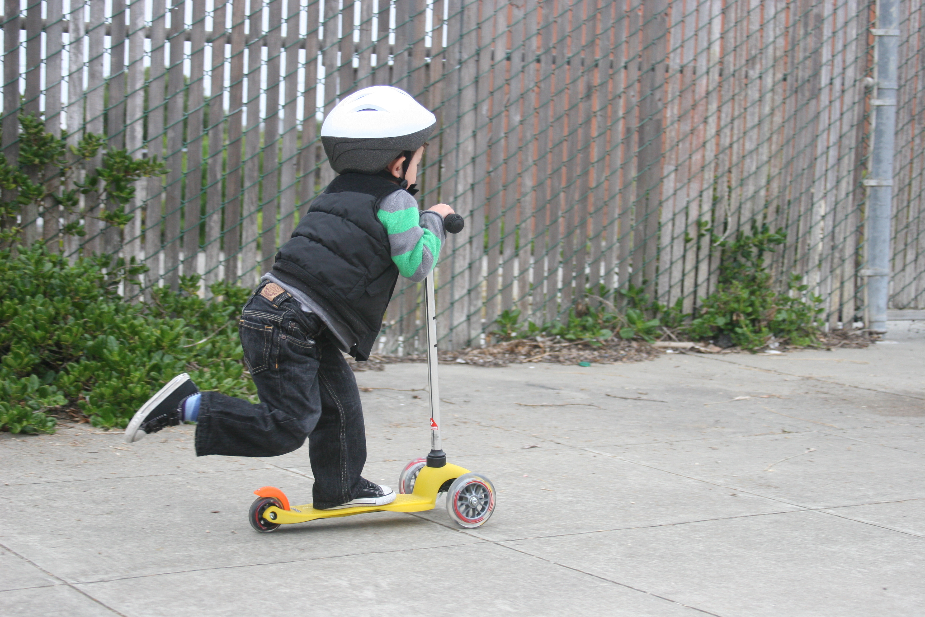 Mini Micro